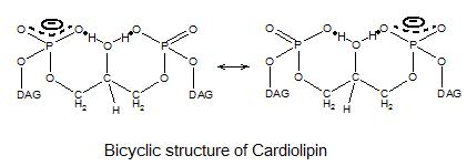 cardiolipin bicyclic structure